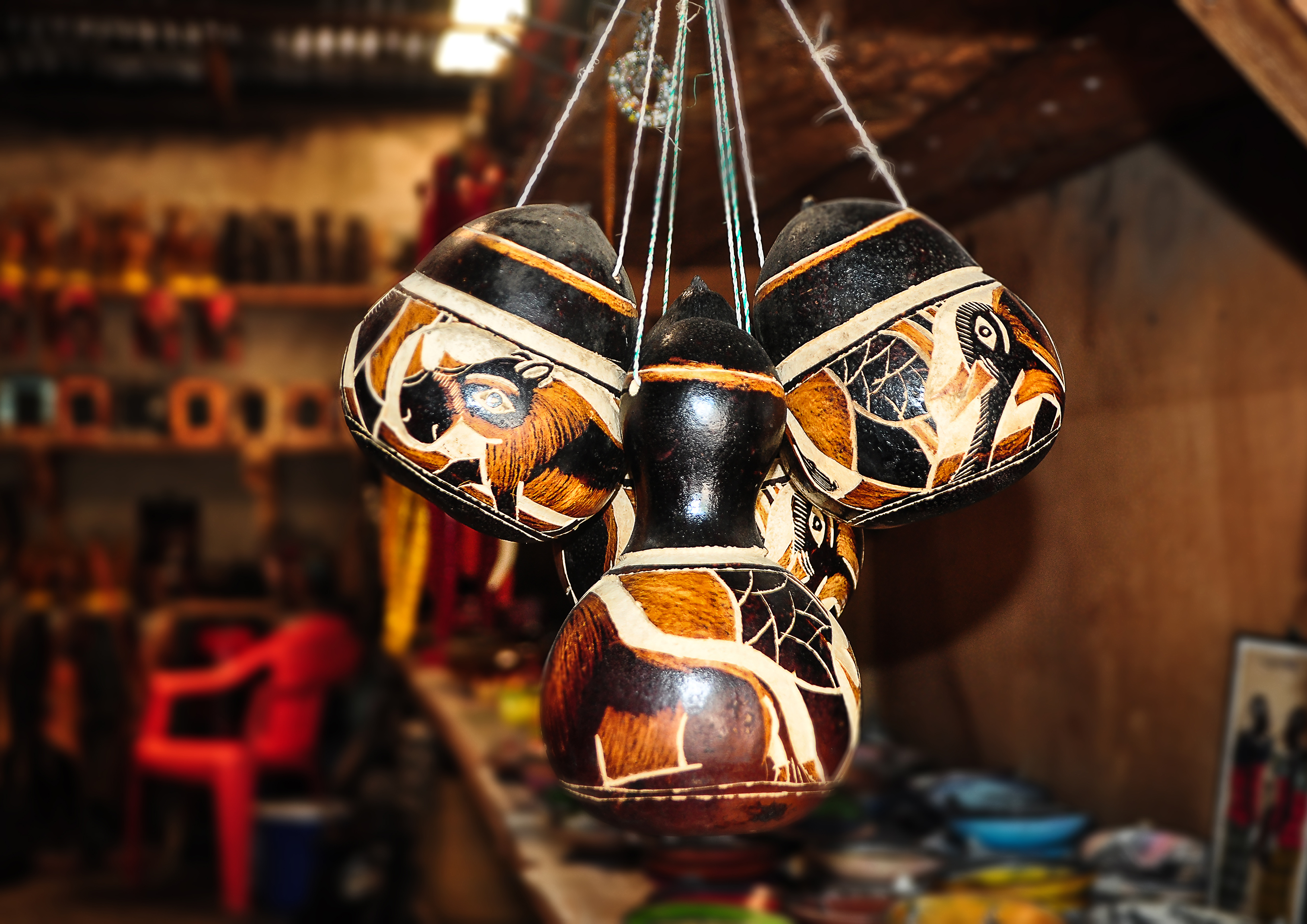 Kiswahili: Vibuyu ni kifaa achacho kinaonesha ni tamaduni ya mwafrika ambavyo vinatumika katika kuhifadhia dawa za asiri na hata kubebea maji ya kunywa This is an image of Cultural Fashion or Adornment from Tanzania